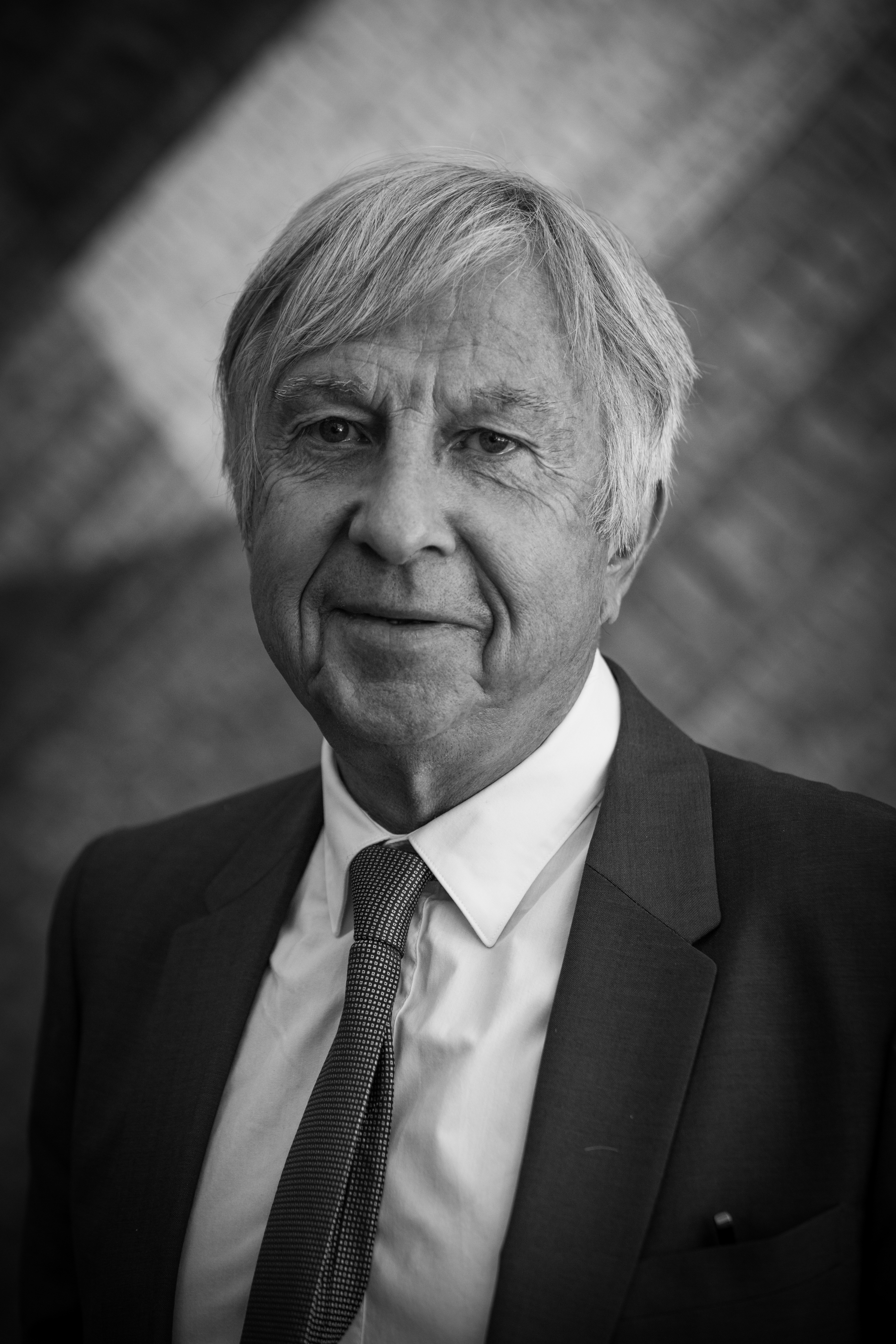 Jean-Pierre Masseret, né le 23 août 1944 à Cusset (Allier), est un homme politique français, membre du Parti socialiste et ancien secrétaire d'État auprès du ministre de la Défense chargé des Anciens combattants. Il est actuellement président du conseil régional de Lorraine et sénateur de la Moselle.